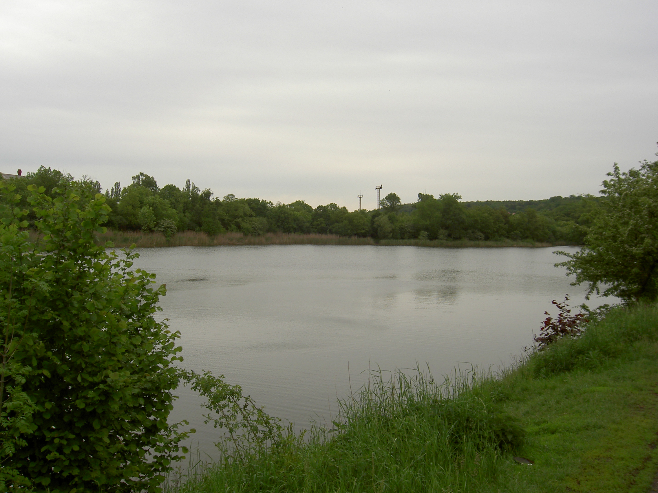 Hořejší rybník